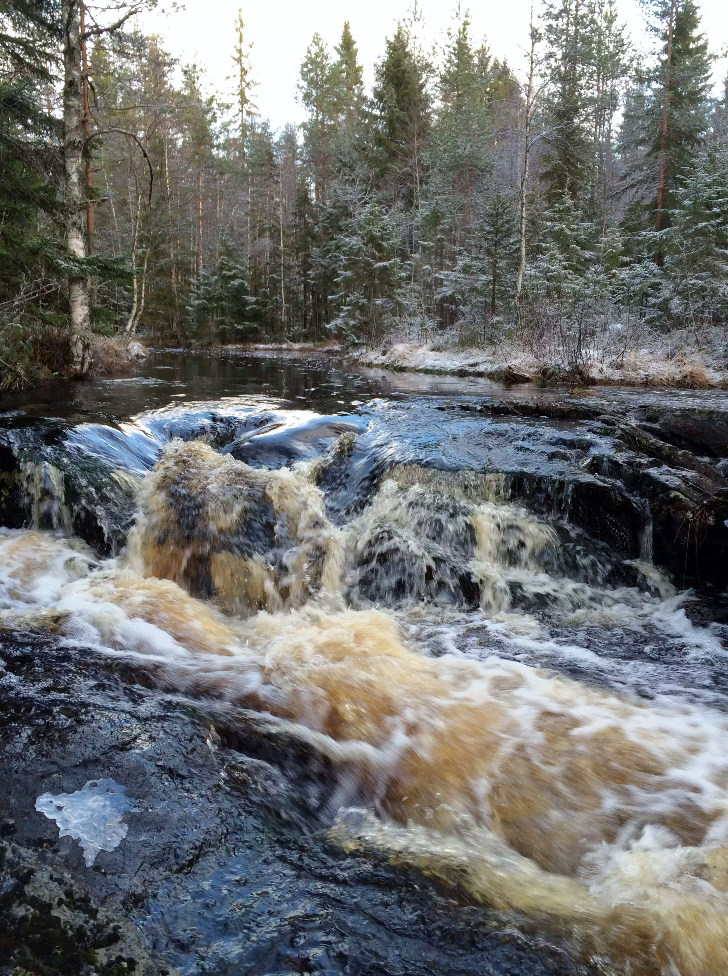 Brattfoss i elva Setta mellom Lierfoss og Setskog i Aurskog-Høland kommune.